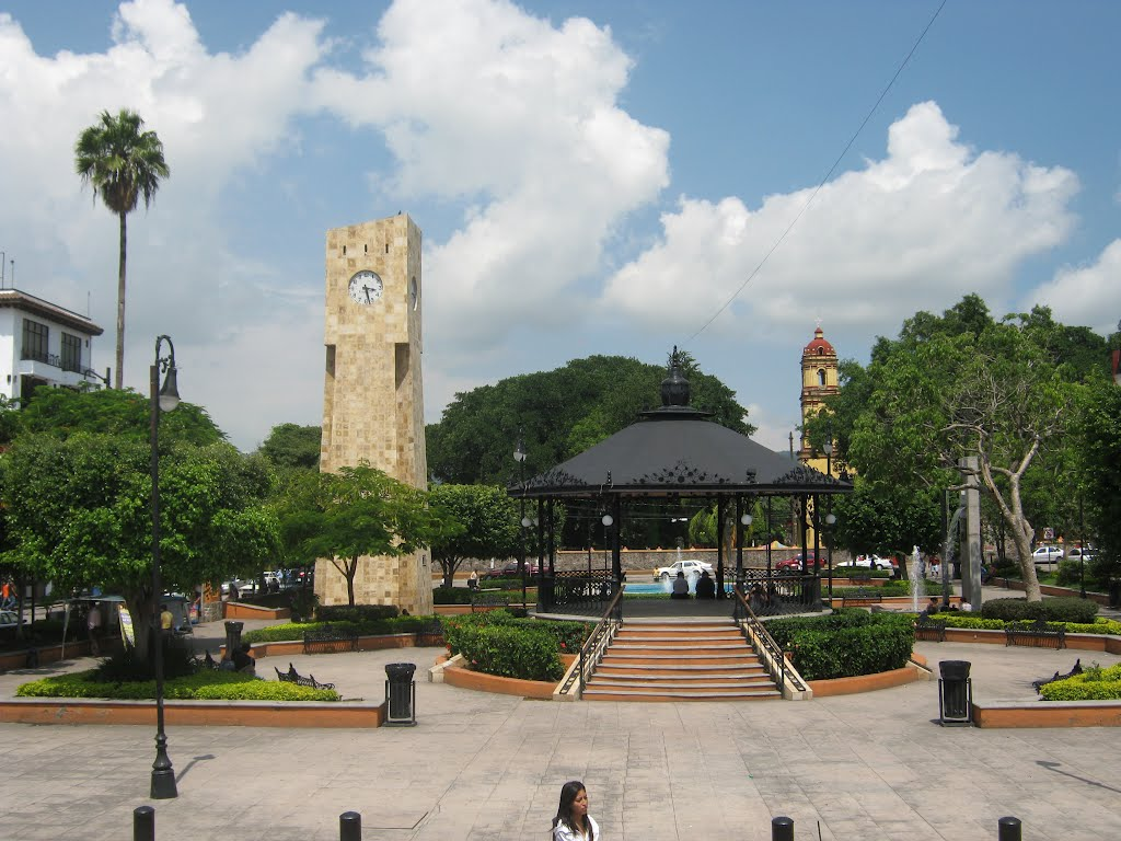 Zocalo de Jiutepec, Morelos